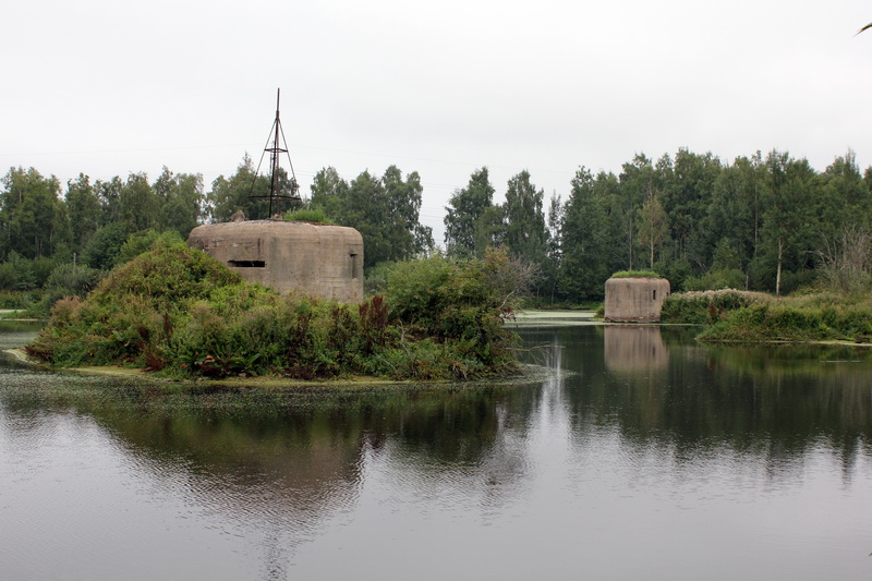 07160 ДОТ №20 Координаты для GPS (WGS 84): N 59° 24' 50.936 E 28° 28' 2.010 Расположение: д.Александровская Горка, 4 км северо-западнее Большелуцкое сельское поселение Описание: ДОТ №20. 2-х амбразурный пулеметный ДОТ. Кингисеппский укрепленный район (№21). Александрогорский батальонный район обороны. 2 рота 263-го ОПАБ. Направления стрельбы: не определялось. Оборудован входом типа "тупик". Техническая справка: 2-х амбразурные ДОТы имеют один боевой каземат и были оснащены деревянными станками системы Горносталева обр. 1931 г. (ПС-31 "СТАД") под 7,62-мм станковый пулемет системы Максима обр. 1910 г. или обр. 1910/30 г. От станков остались, в основном, остатки крепления (швеллеры) и амбразурные узлы с пулеметными заслонками П-31. По нормативам, сектор обстрела пулемета составлял 60° (т. е. +/-30°), углы возвышения/снижения - +/- 5°. Боезапас на каждый пулемет - 6000 патронов 7,62x54 мм или М1908/30 в коробках с лентами в каземате + 30000 дополнительный в тех. помещении. ДОТы имеют ружейные амбразуры защиты входа, на большинстве из которых сохранились ружейные заслонки обр. 1931 г. (РЗ-31). ДОТ расположен на островке технологического пруда. Подойти к нему можно только зимой по льду.